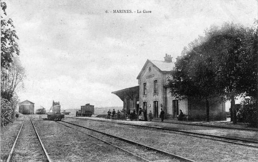 Intérieur de la gare de Marines (voies métriques)